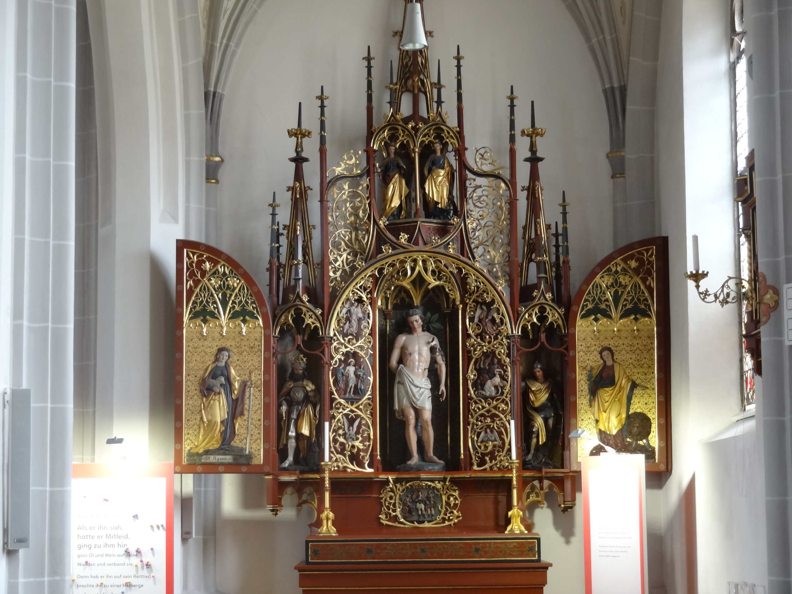 Sebastiansaltar (rechter Seitenaltar) der Pfarrkirche St. Peter in Velden an der Vils (Lkr. Landshut)